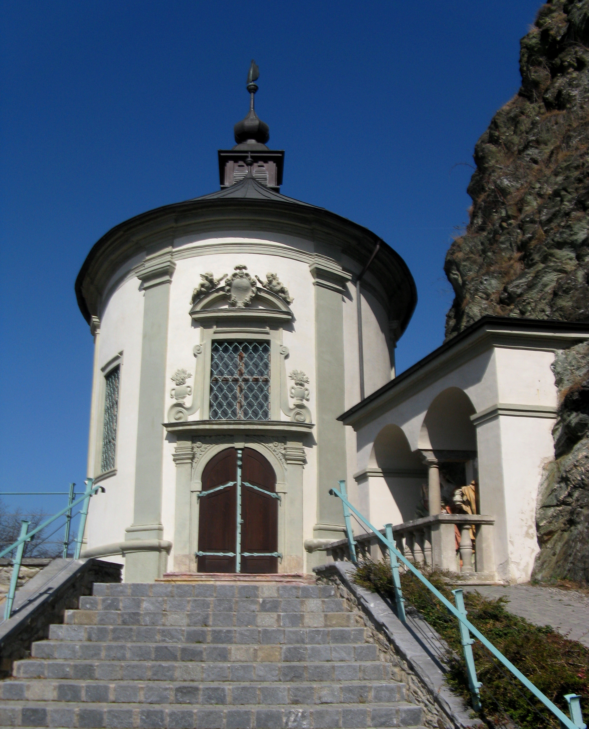 Grazer Kalvarienberg, Dismas- oder Mariatroster-Kapelle